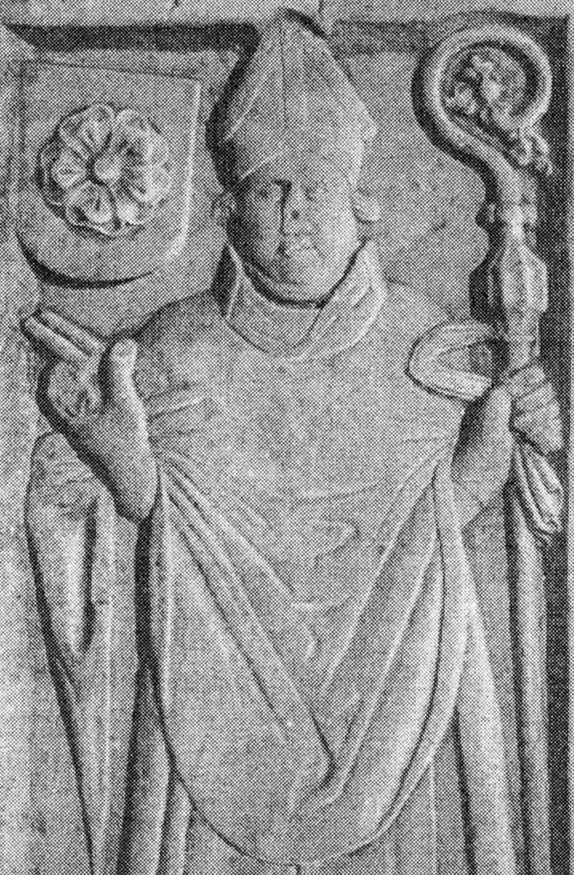 Náhrobek biskupa Jošta z Rožmberka